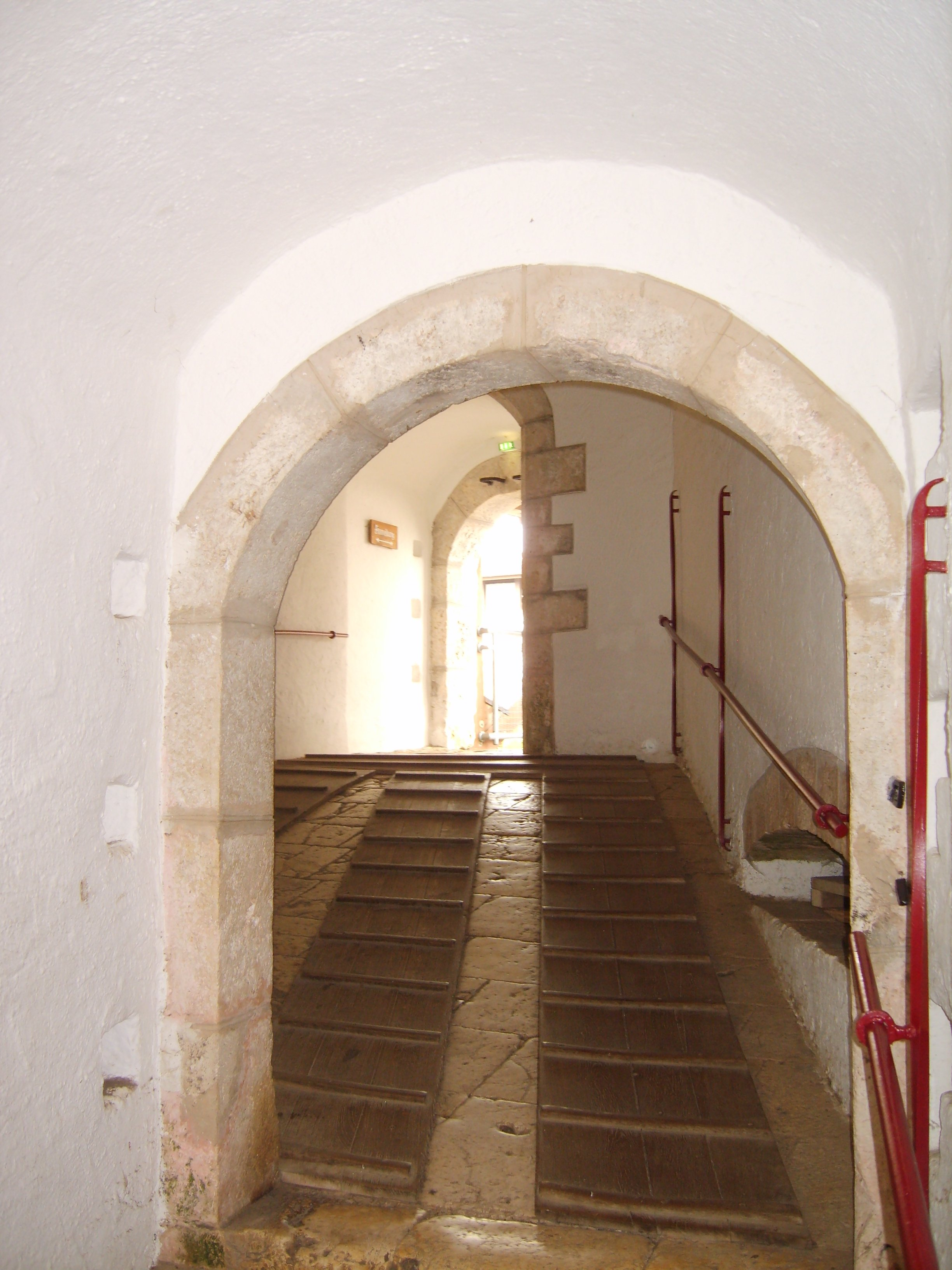 Burg Wildenstein Burg Wildenstein: Tordurchgang